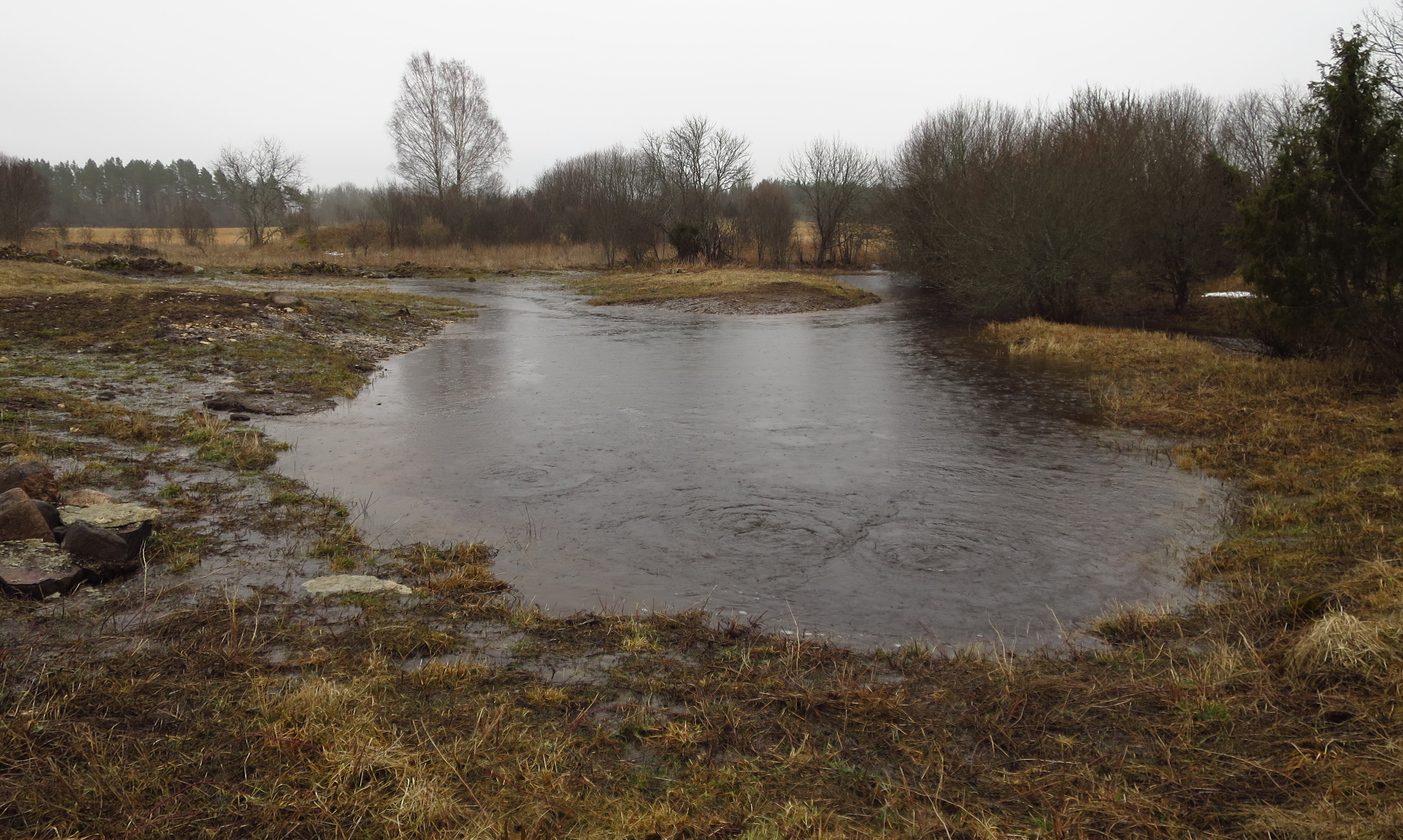 Salajõe allikad (Tiberna auk) Salajõe maastikukaitsealal kevadel